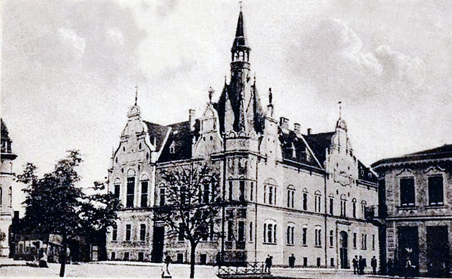 Caransebeș, Rathaus um 1900